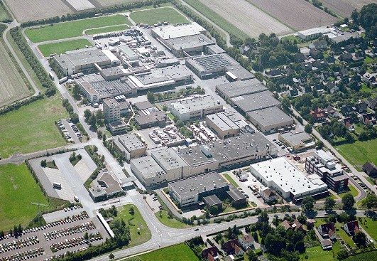 Luftaufnahme Elastogran-Stammsitz in Lemförde